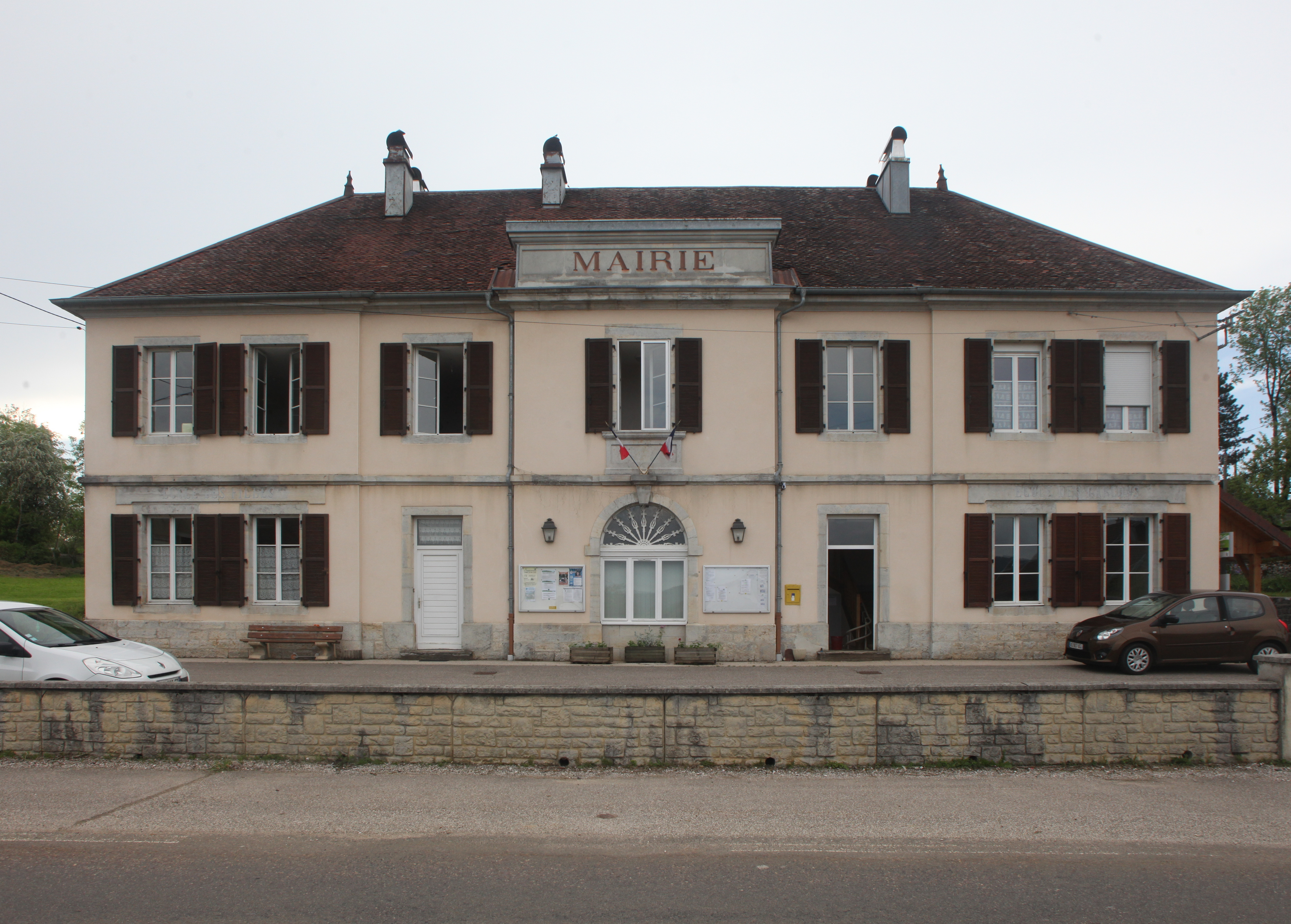 Mairie du Pasquier (Jura).